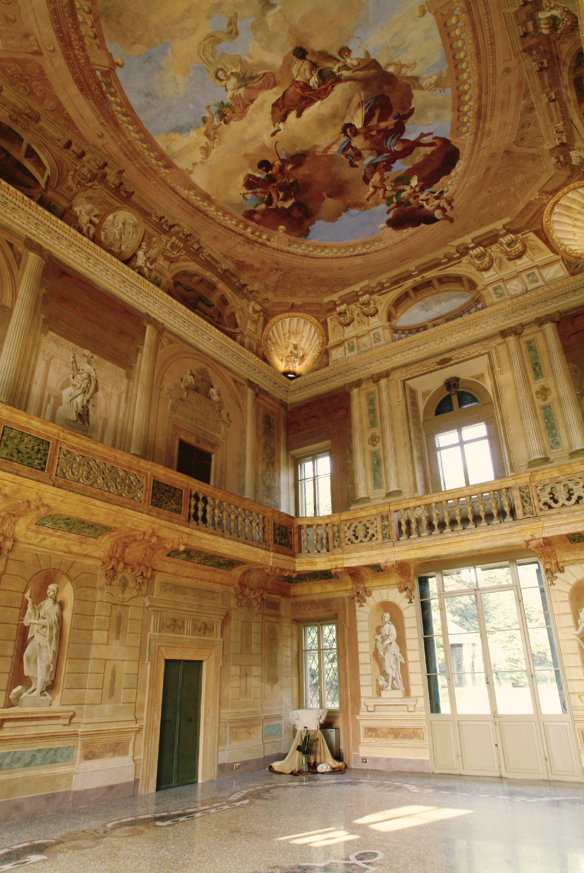 L'ampio salone centrale della Villa Mosconi Bertani del 1735 che occupa due piani e presenta degli affreschi degli autori bolognesi Pesci e Valliani.